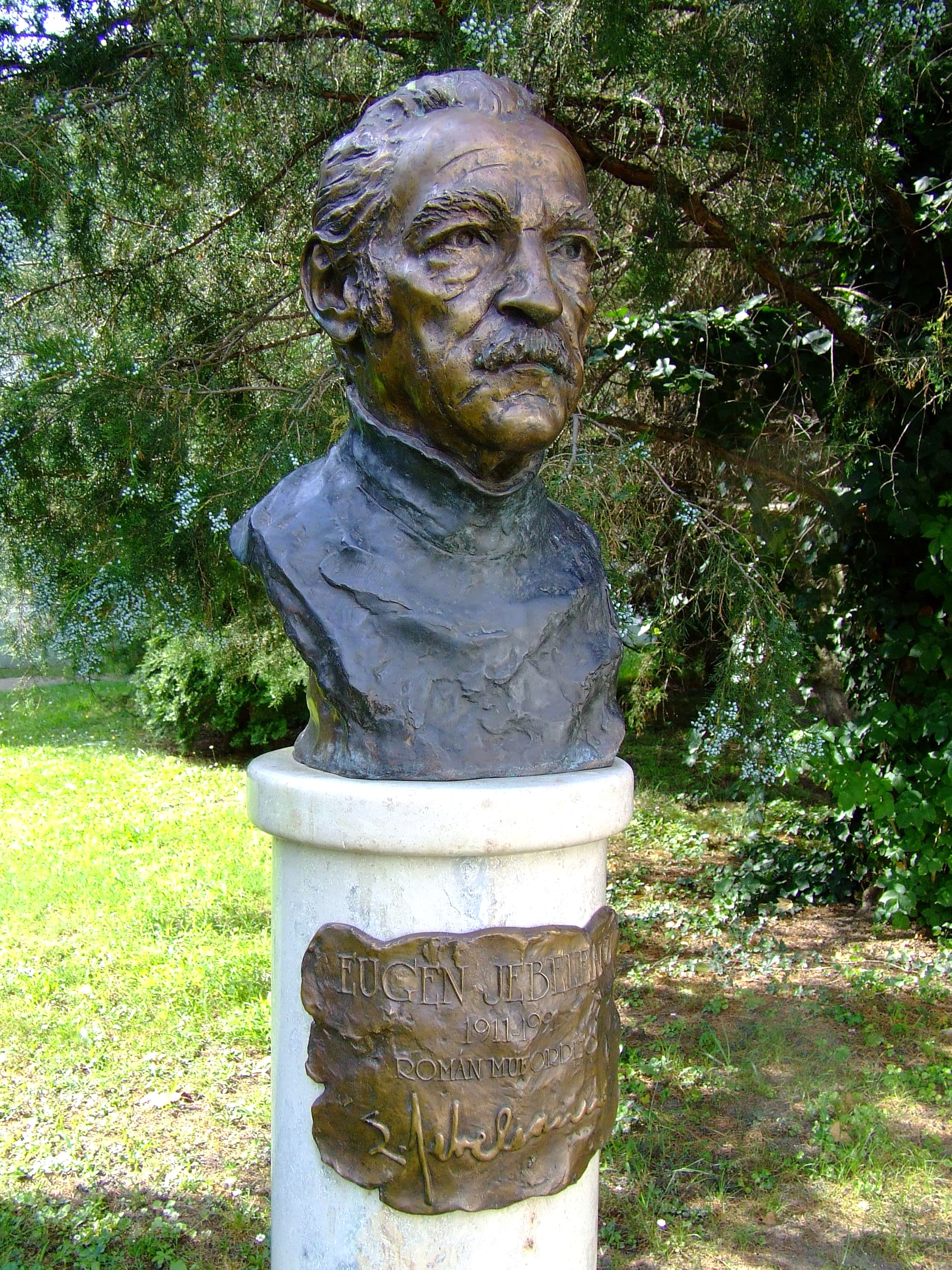 Eugen Jebeleanu (1911–1991) /Felállítás 2005. szeptember 2., Kutas László/ Petőfi Sándor művei román fordítójának szobra Kiskőrösön a Műfordítói szoborparkban van